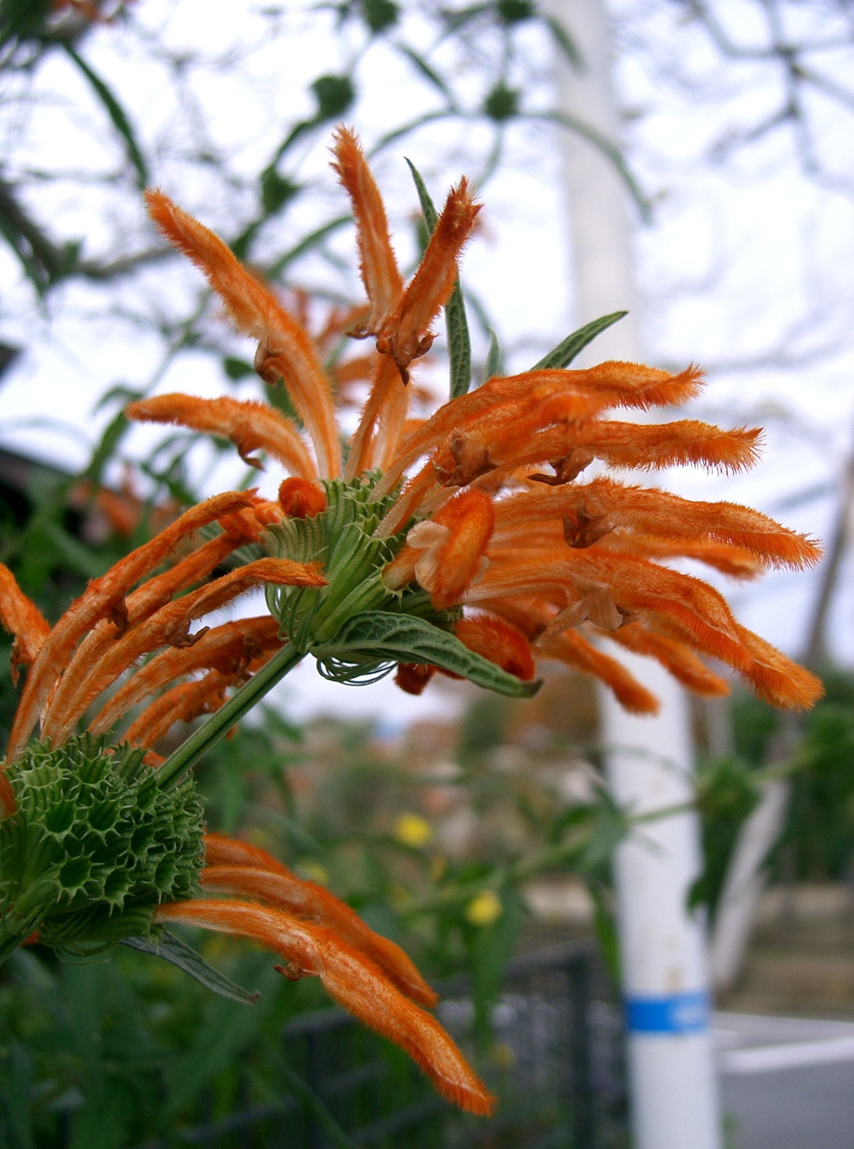 Leonotis leonorus